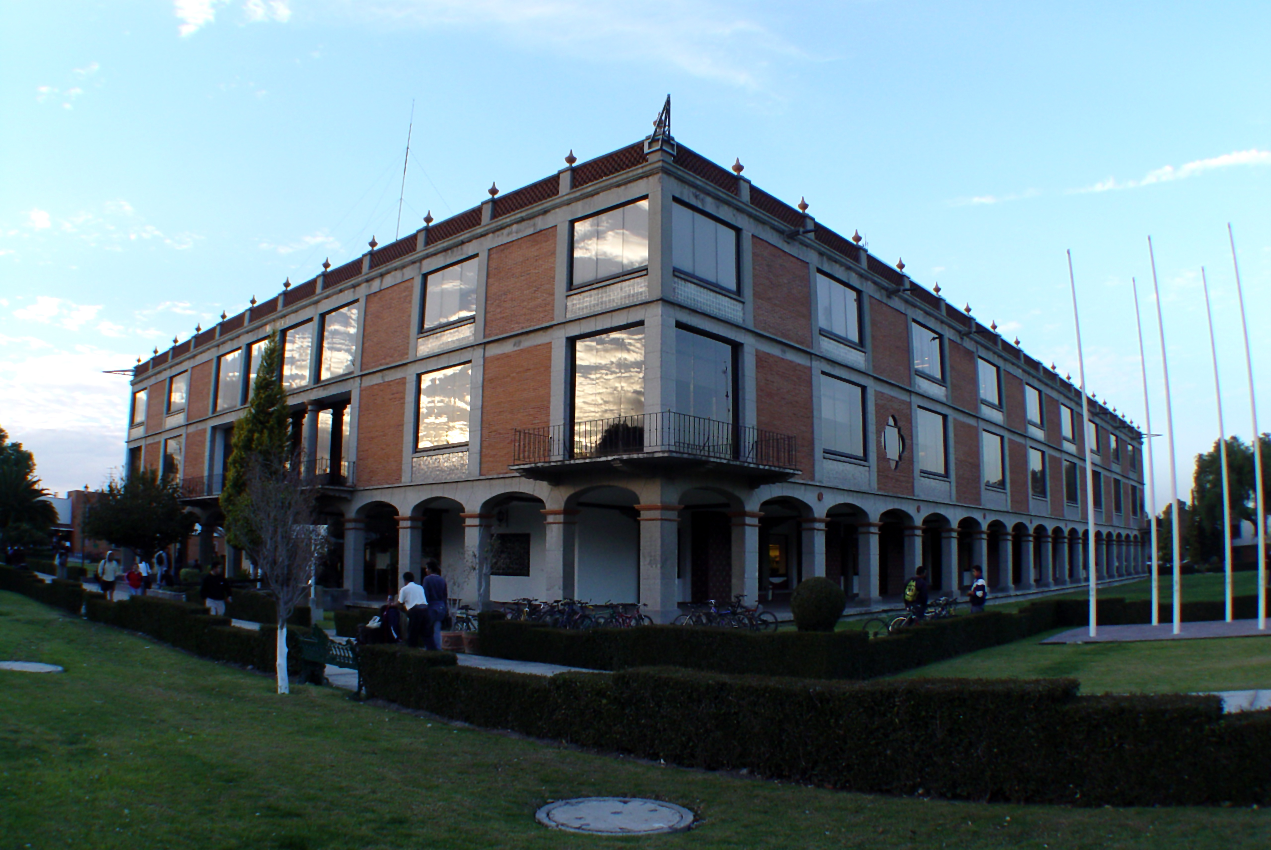 Biblioteca de la UDLAP (CIRIA)